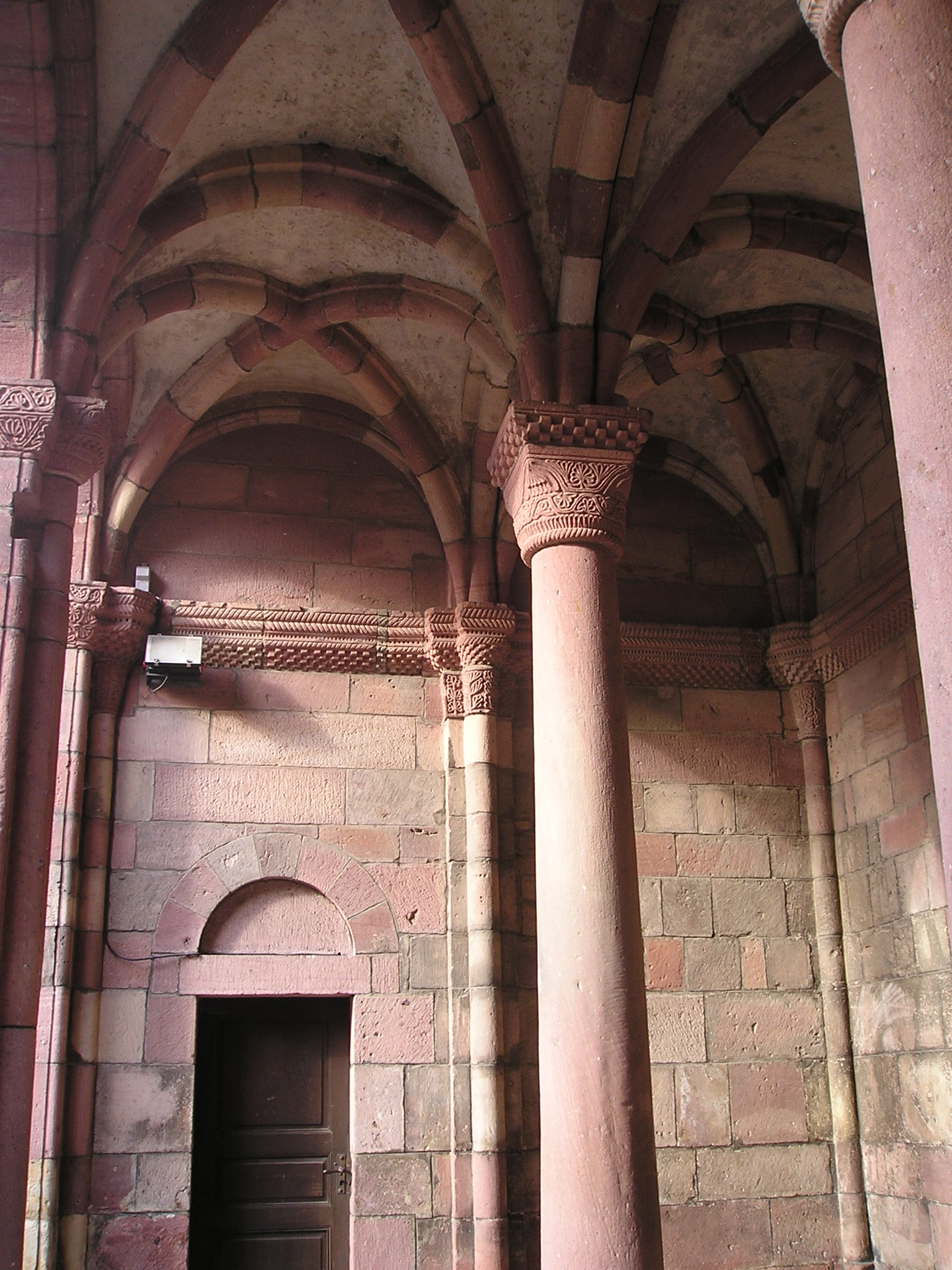 Stiftskirche Lautenbach im Elsaß Vorhalle